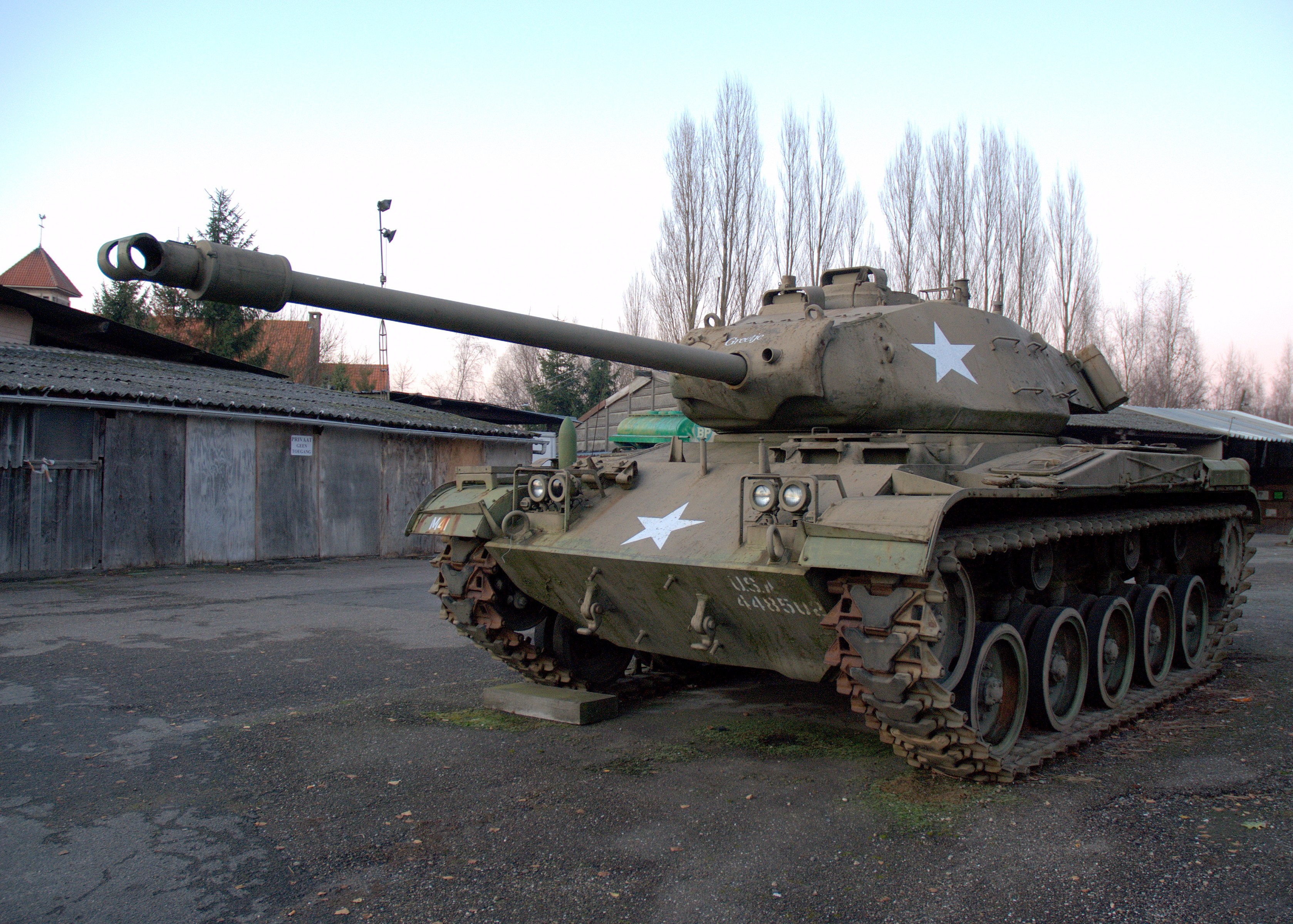 Amerikaanse tank M41 Walker Bulldog te Ulbeek, Wellen, België